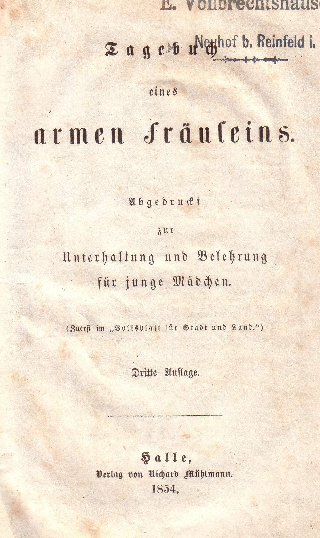 Buchcover: Tagebuch eines armen Fräuleins, Autor: Marie Nathusius (1817-1857)